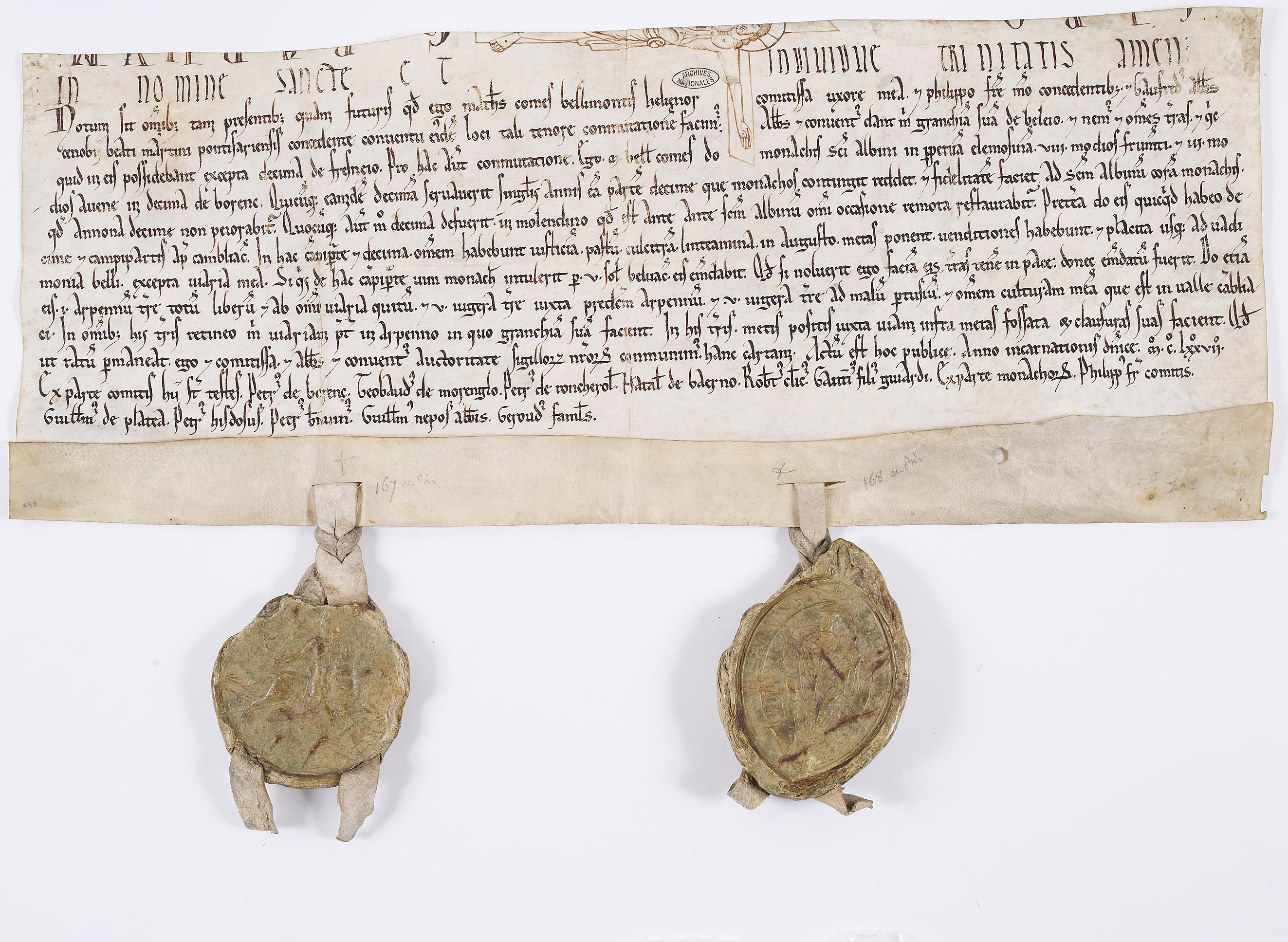 Mathieu, comte de Beaumont, acquiert certaines terres des religieux de Saint-Martin de Pontoise moyennant la concession de quelques droits seigneuriaux, 1177